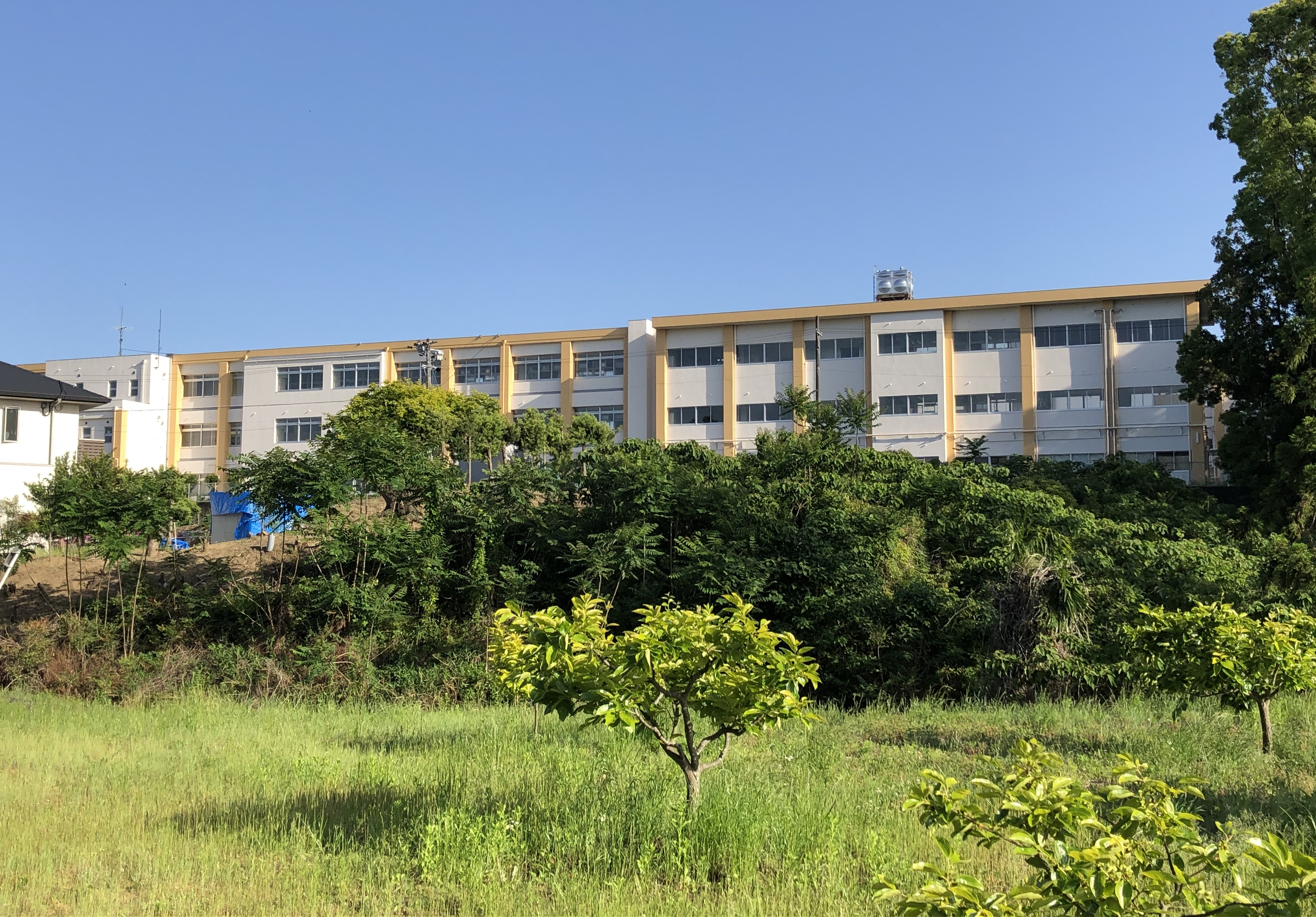 岡崎市立細川小学校（岡崎市細川町）